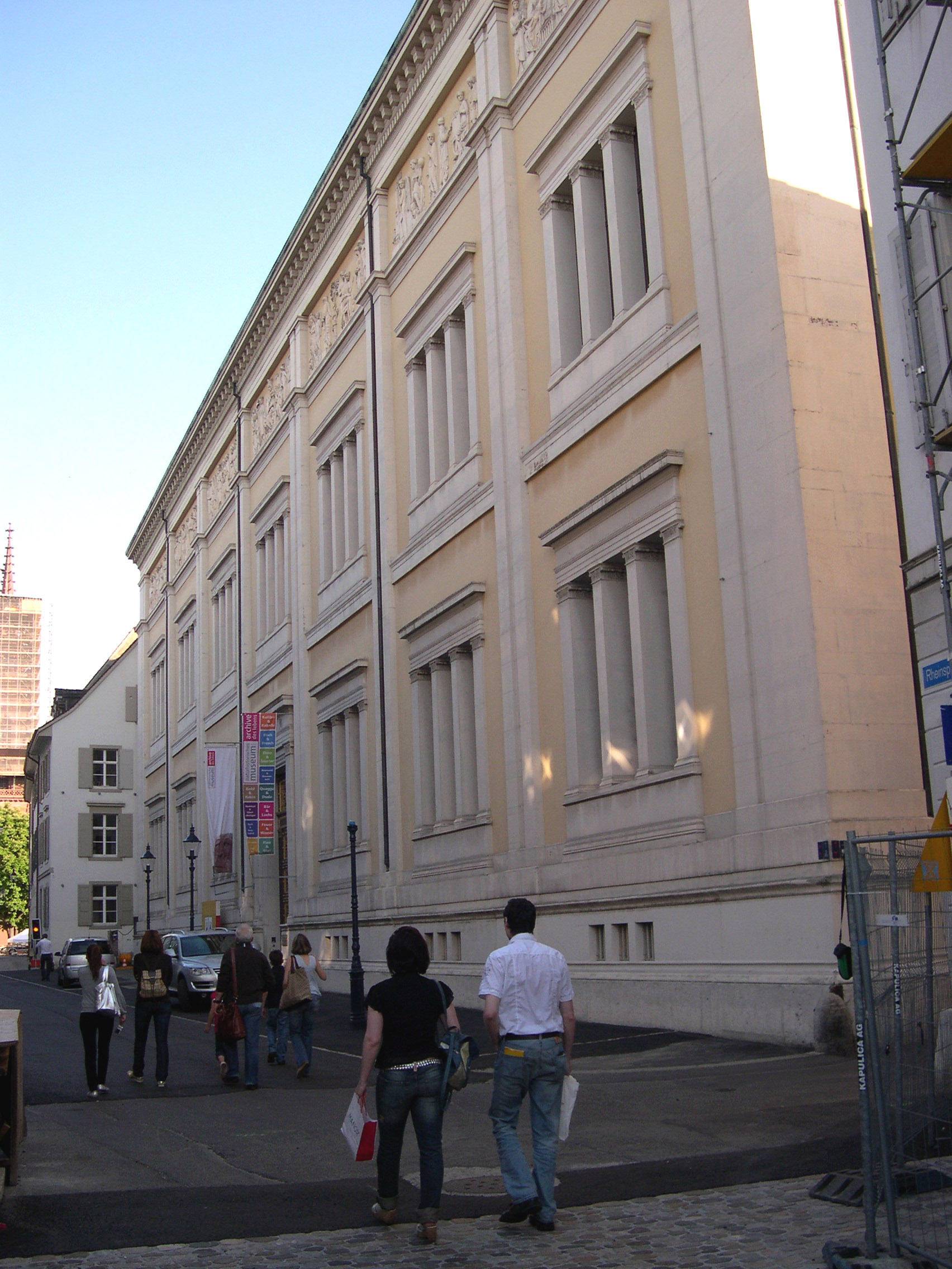 Museum an der Augustinergasse / Naturhistorisches Museum Basel. Ansicht von Nordwesten her.